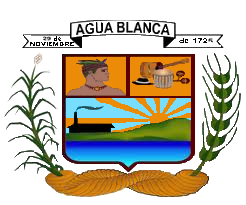 Escudo del municipio Agua Blanca, estado Portuguesa, Venezuela